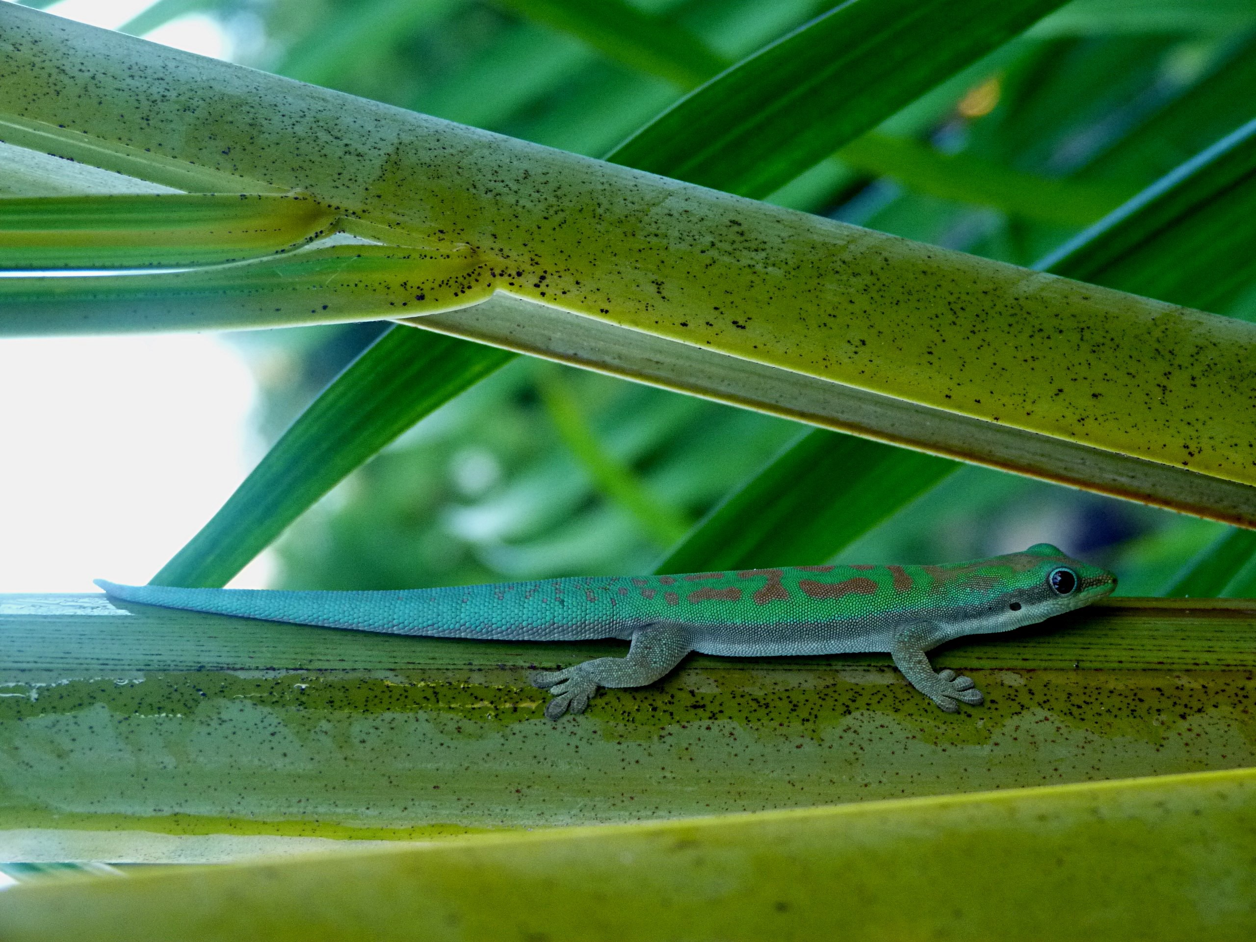 Phelsuma modesta, espèce de geckos, région de Ranohira, Madagascar.